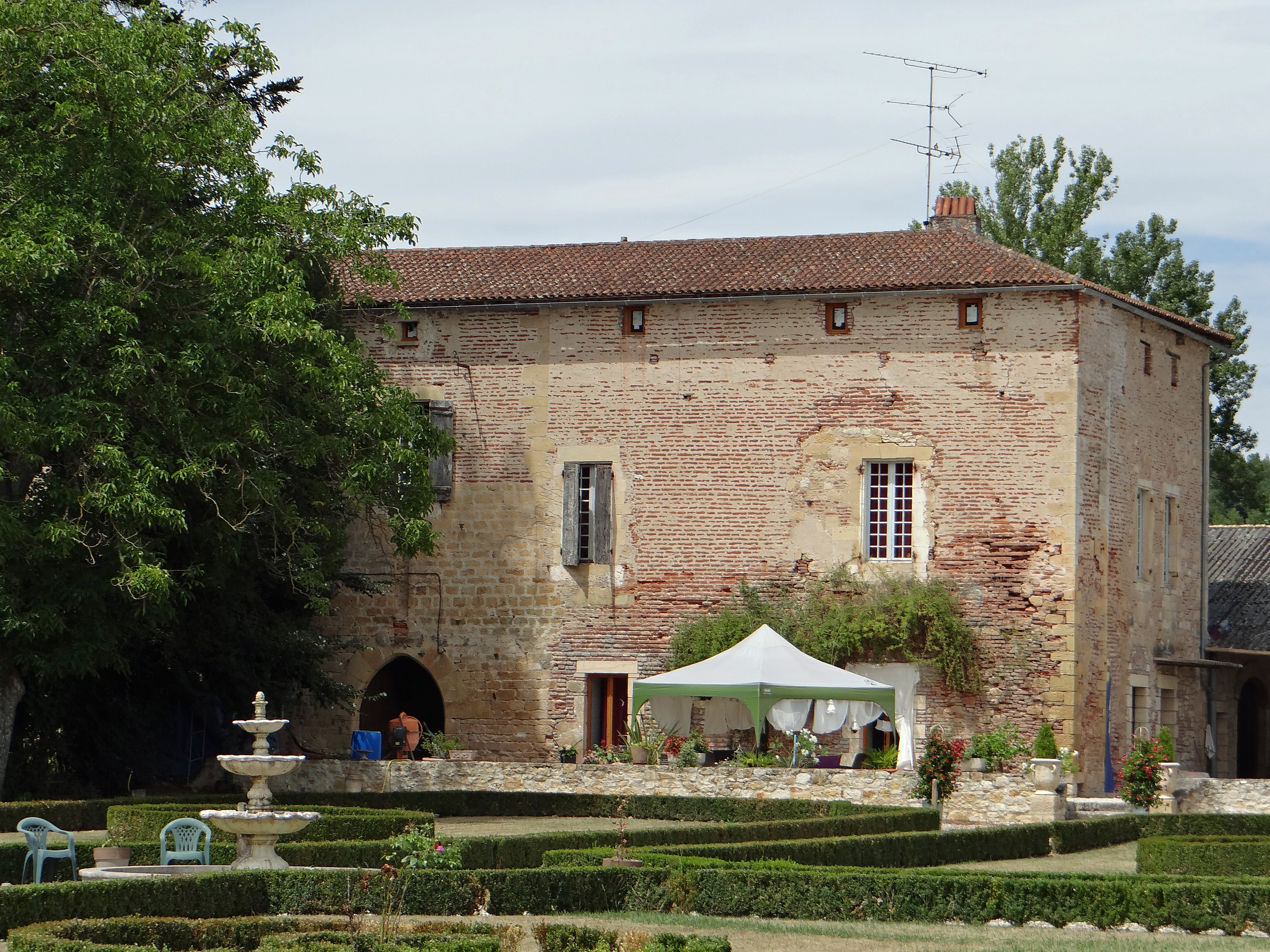 Saint-Vite - Château de Lapoujade - Façade côté route